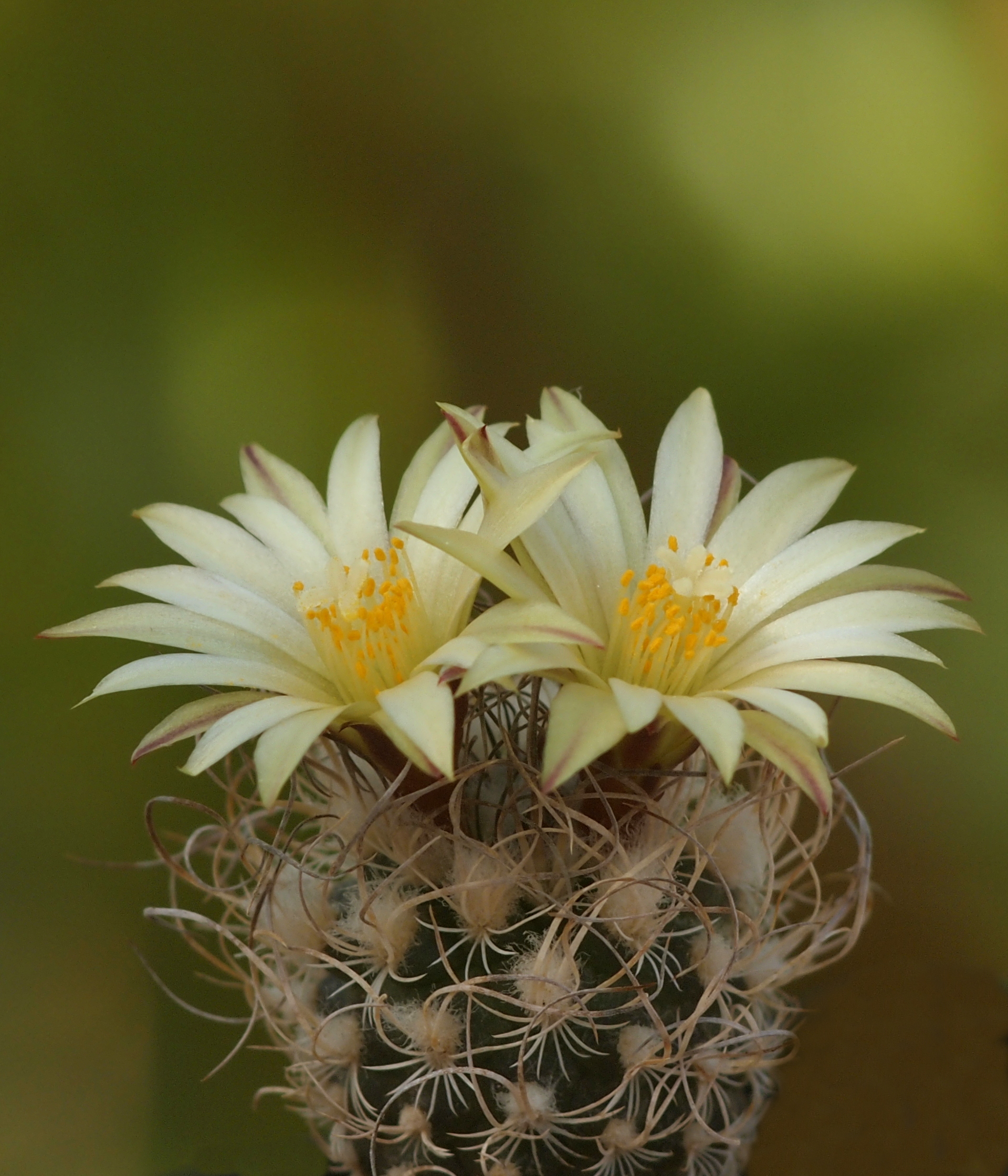 Pen E-PL2 mit Schacht Travenar 3,5/135 R Blende 5,6 (2 Zwischenringe - 5 und 15mm -Exakta Anschluss)